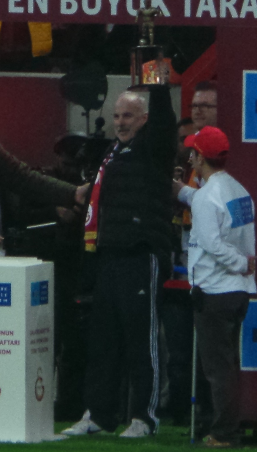 Erhan Önal